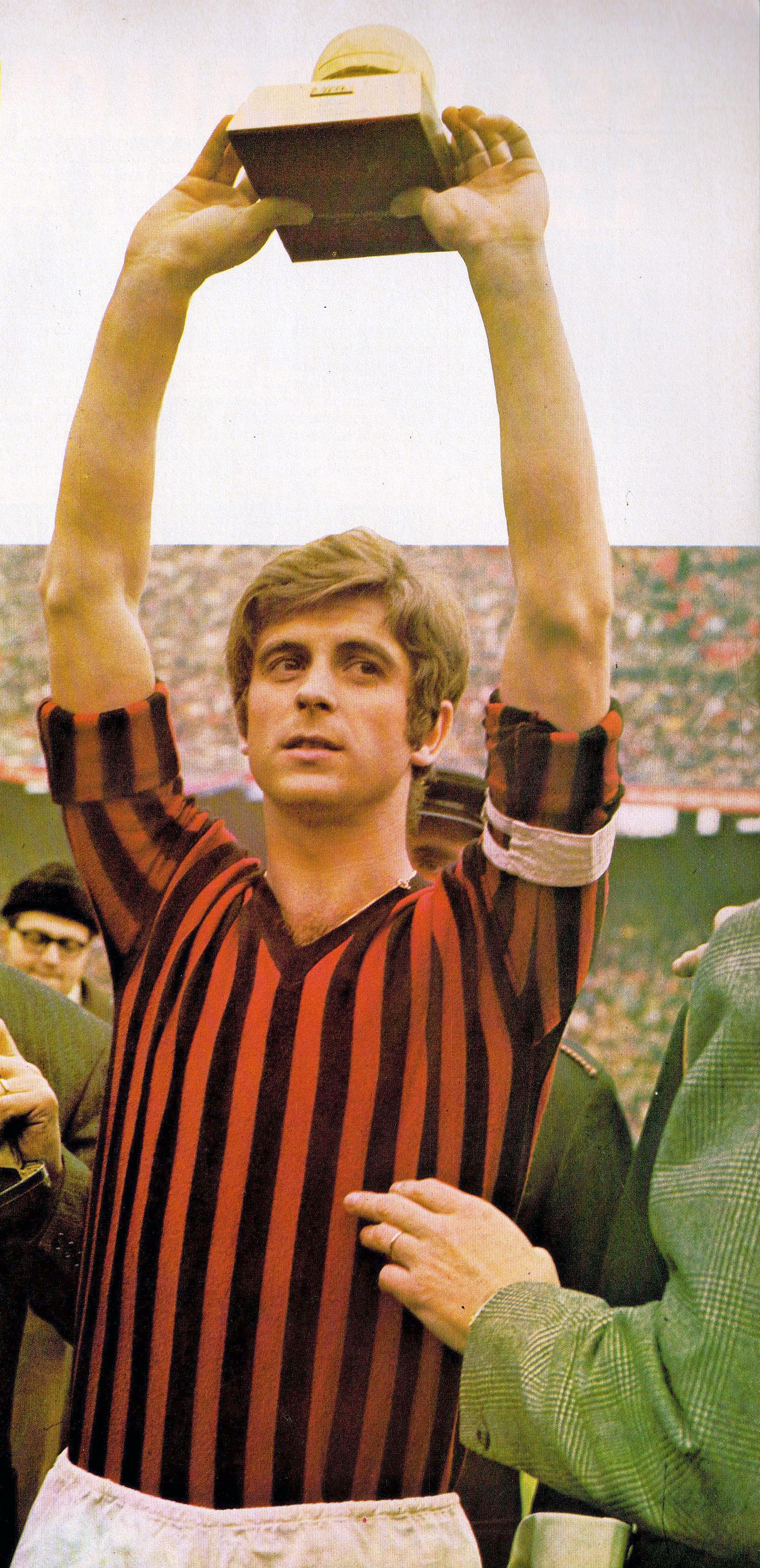 Milano (Italia), stadio San Siro, 19 aprile 1970. Il calciatore italiano Gianni Rivera, capitano del Milan A.C., solleva il Pallone d'oro di France Football vinto nel 1969 quale miglior giocatore europeo; Rivera fu il primo calciatore italiano a ricevere tale riconoscimento — escludendo l'italo-argentino Omar Sívori, insignito del premio nel 1961 grazie al suo status di oriundo.